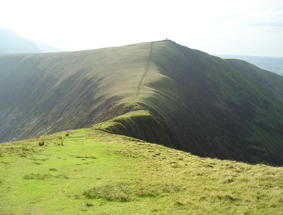 Mynydd Tal-y-Mignedd from Trum y Ddysgl